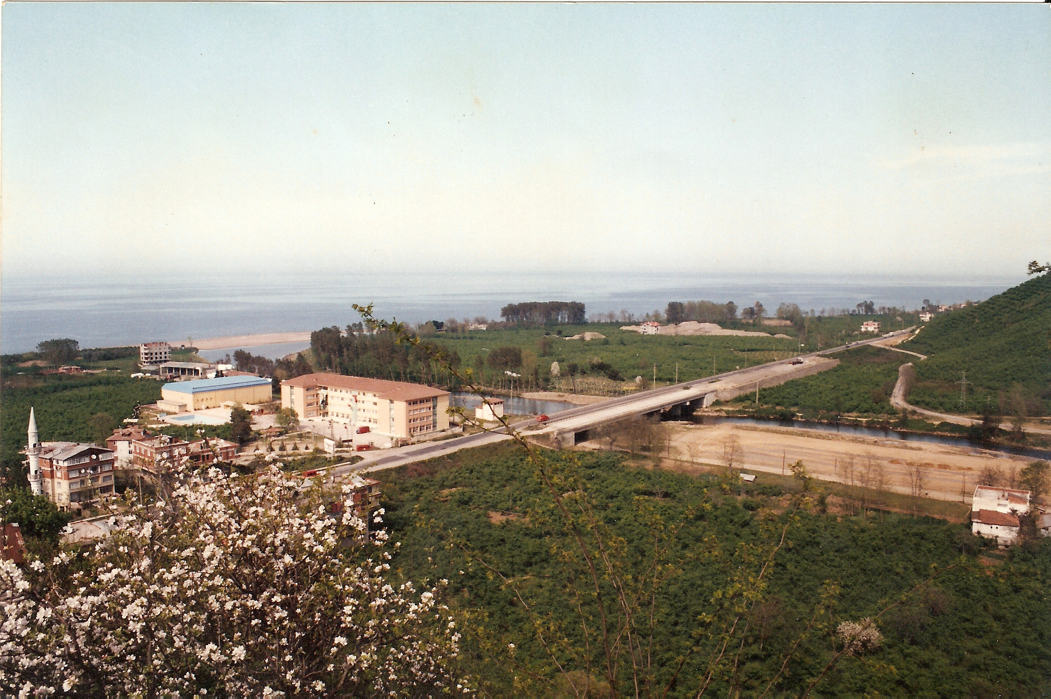 Turnasuyu